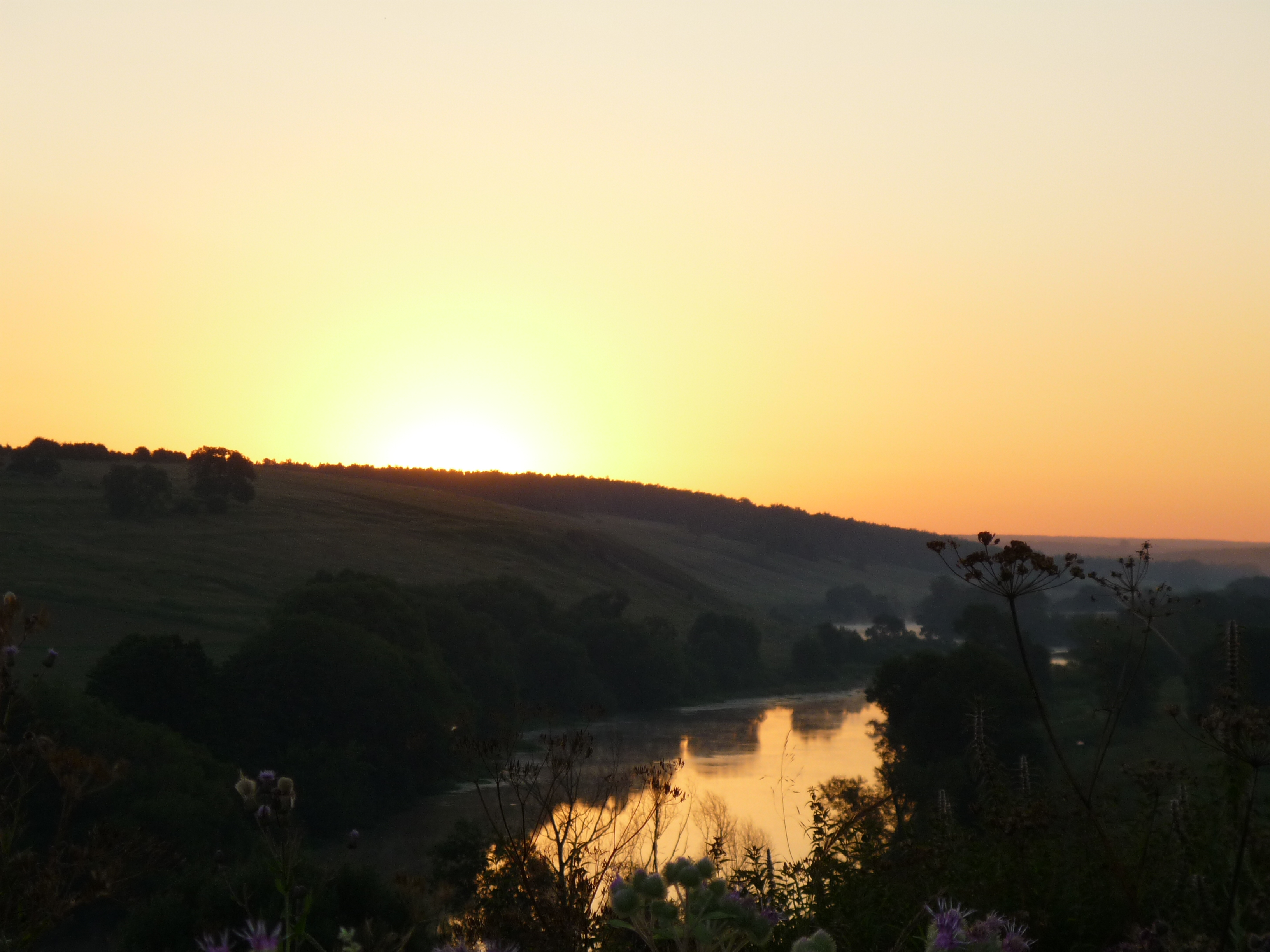 Рассвет на Упе.